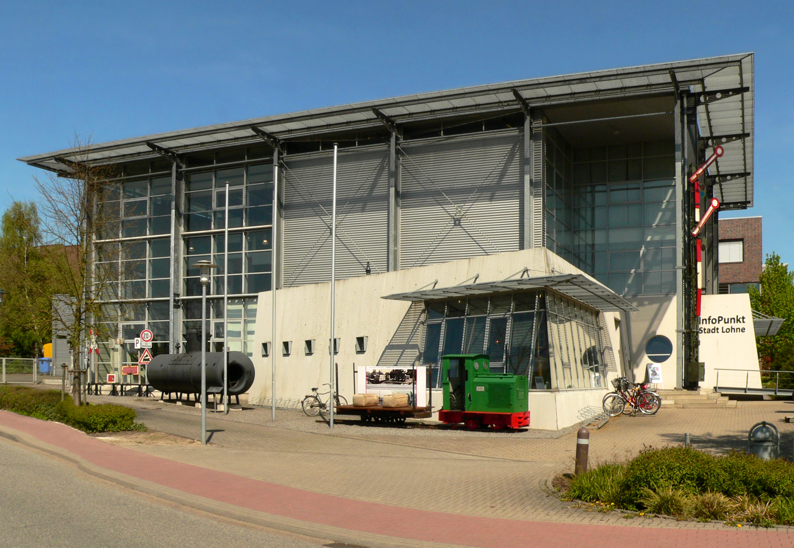 Industriemuseum Lohne